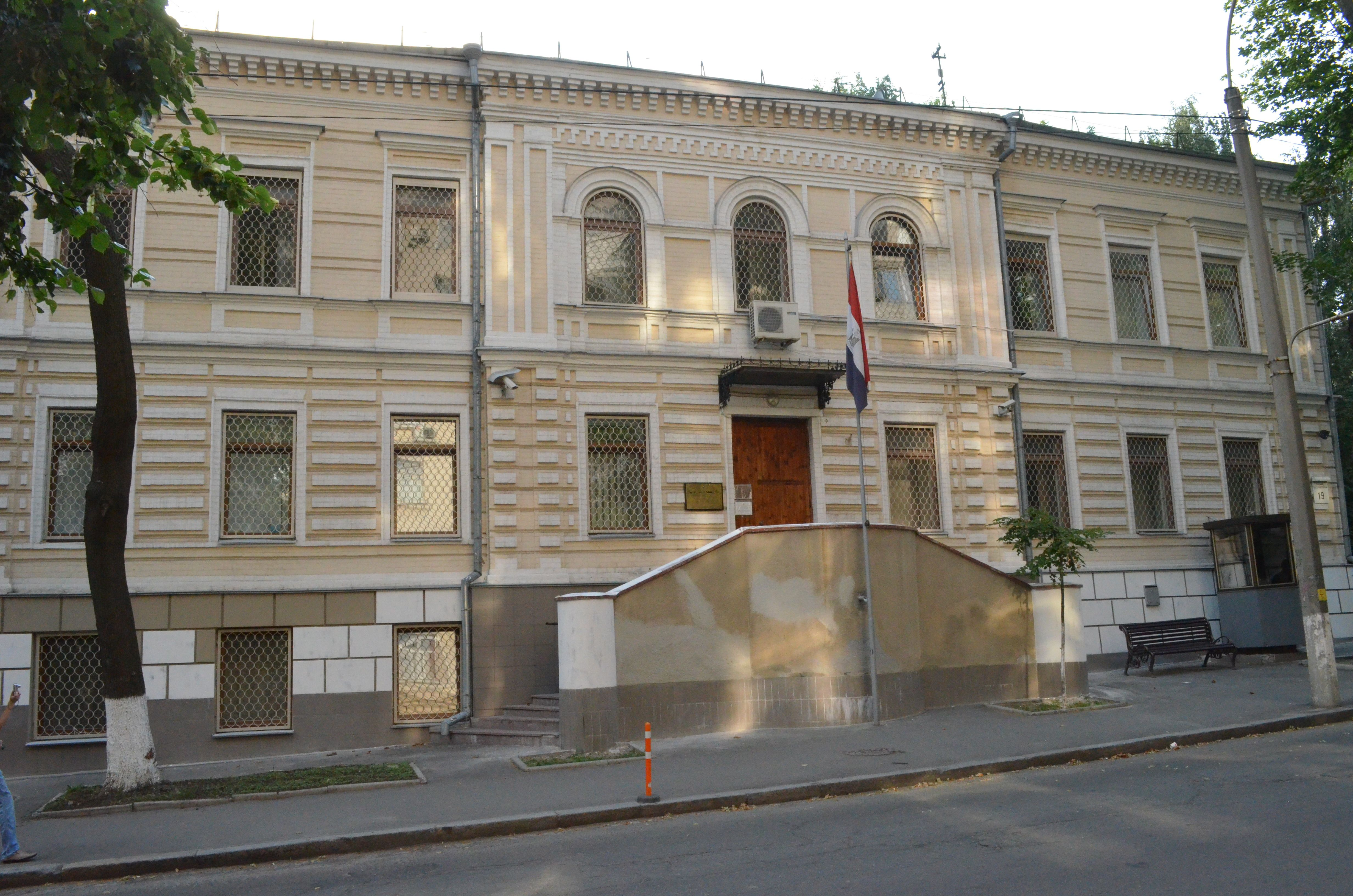 Вулиця Обсерваторна (Київ). Будинок 19